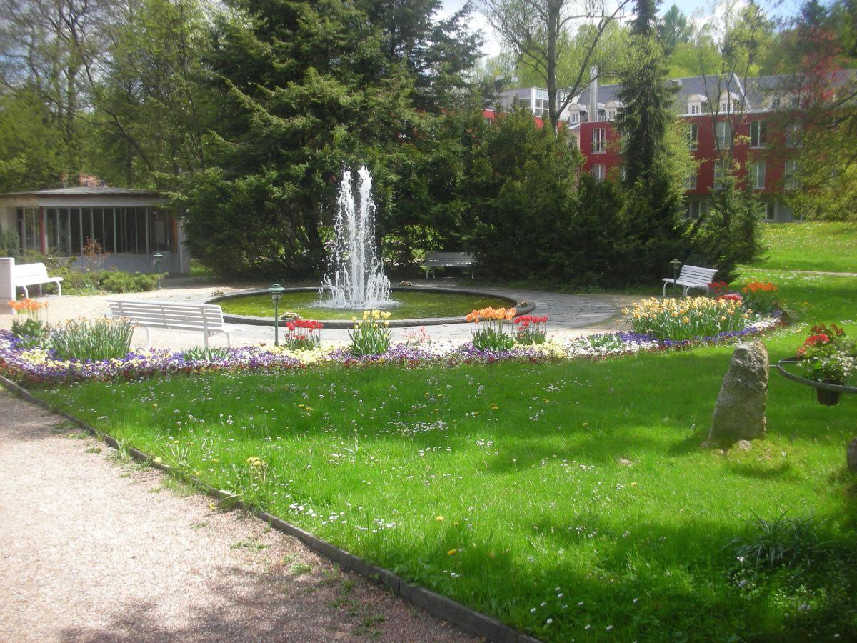 Springbrunnen in den Parkanlagen von Bad Brambach